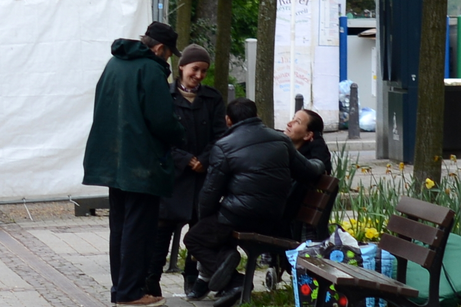 Op der Theaterplaz.